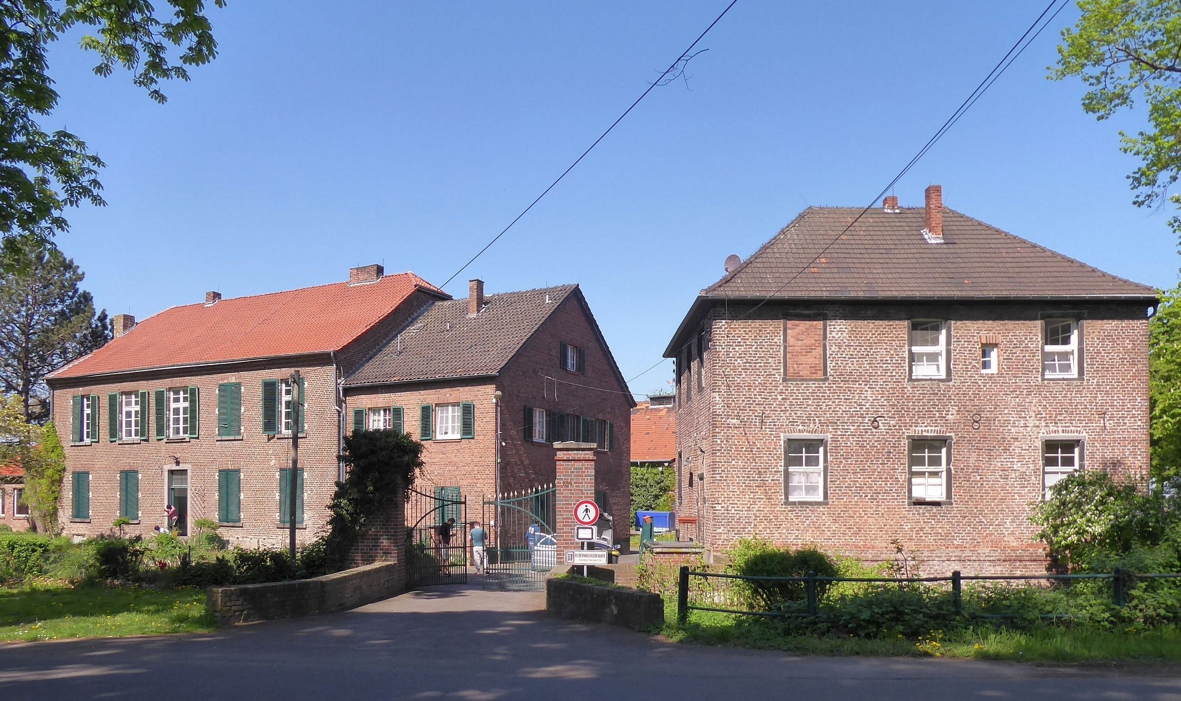 Dikopshof